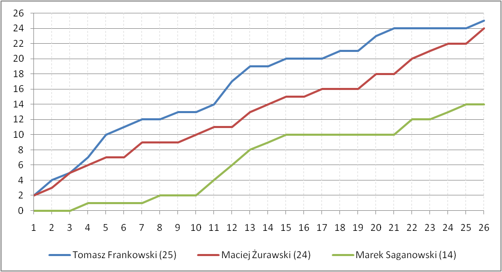 Wykres przedstawiający przebieg rywalizacji o tytuł Króla Strzelców w poszczególnych kolejkach sezonu piłkarskiej Ekstraklasy w sezonie 2004/2005